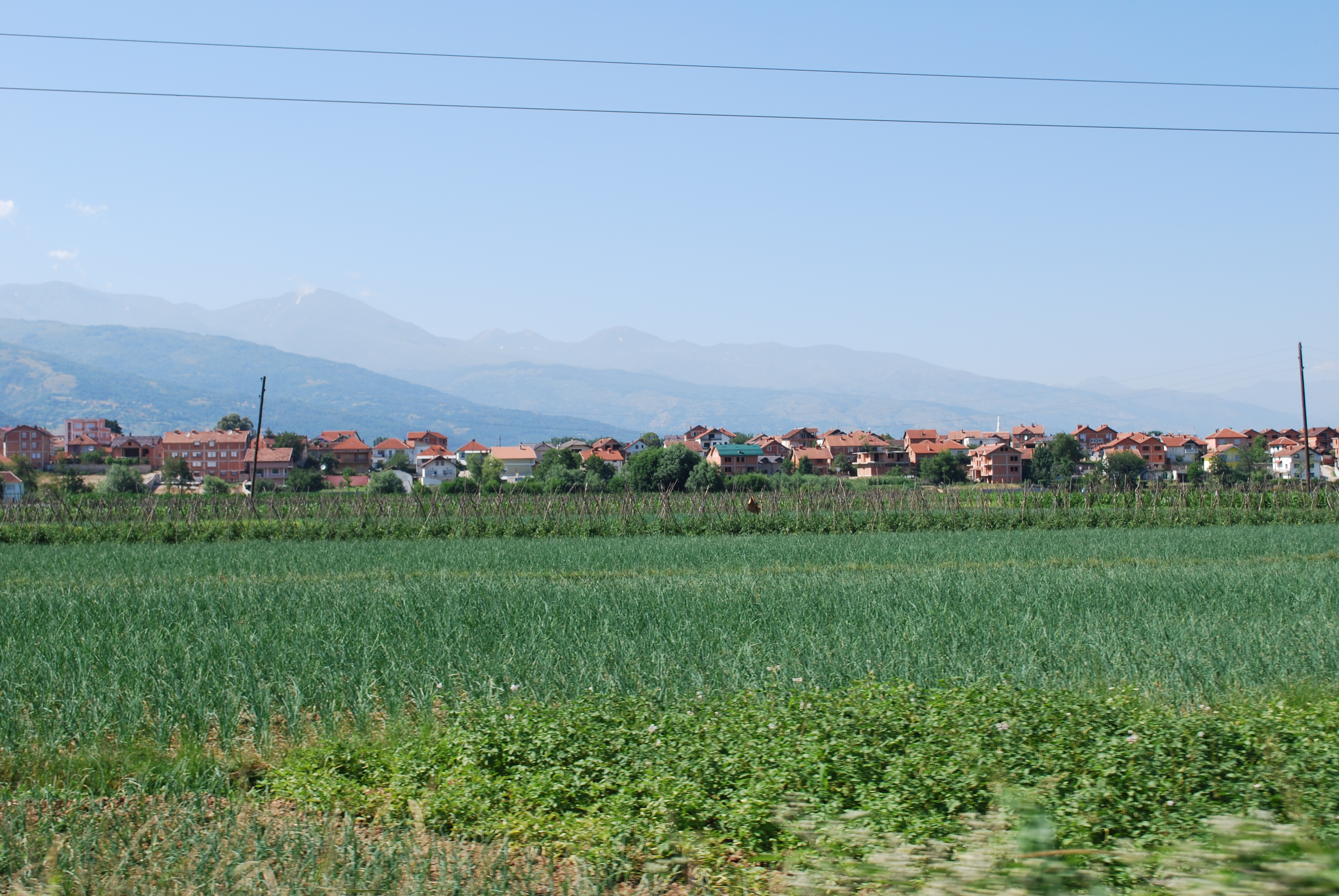 Долна Бањица, Гостивар, Македонија